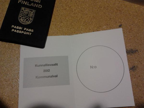 Äänestyslippu kunnallisvaaleissa 2012